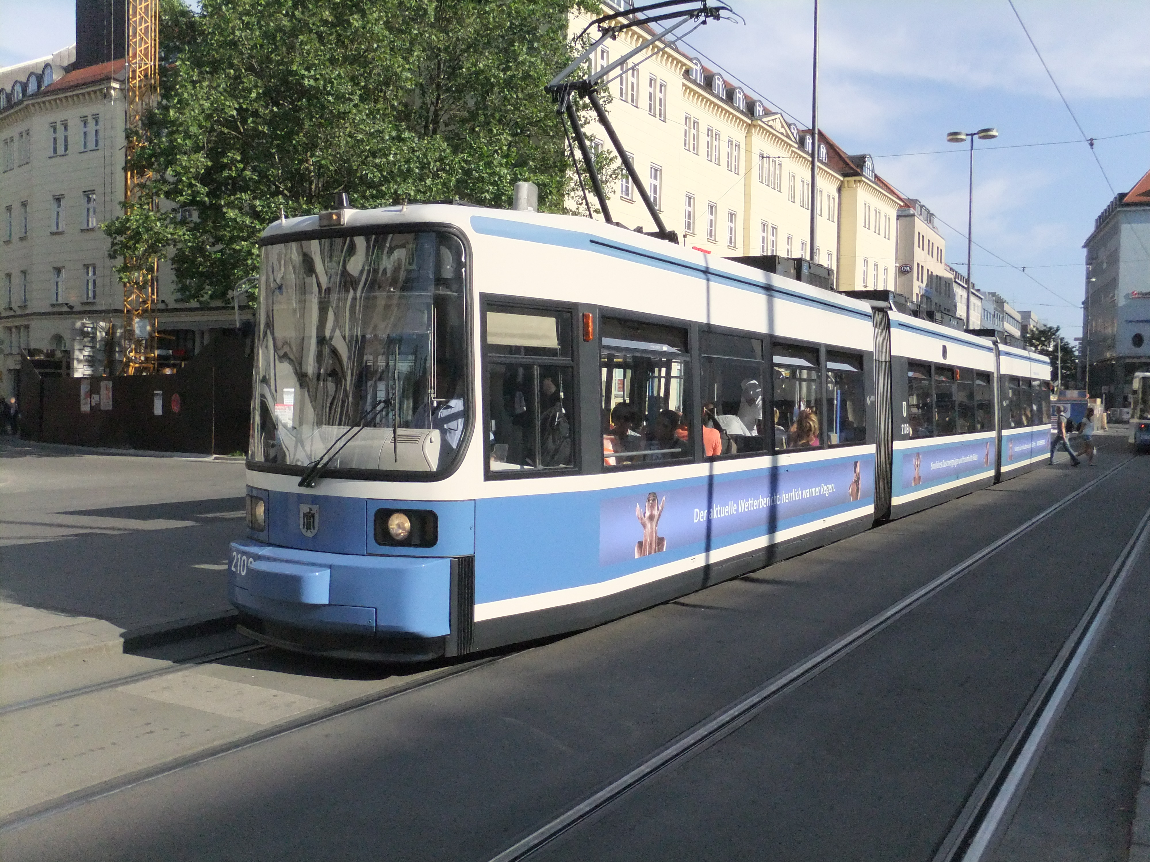 Straßenbahn der Münchener Straßenbahn der Baureihe R in der Straßenbahnhaltestelle des Münchener Hauptbahnhofs